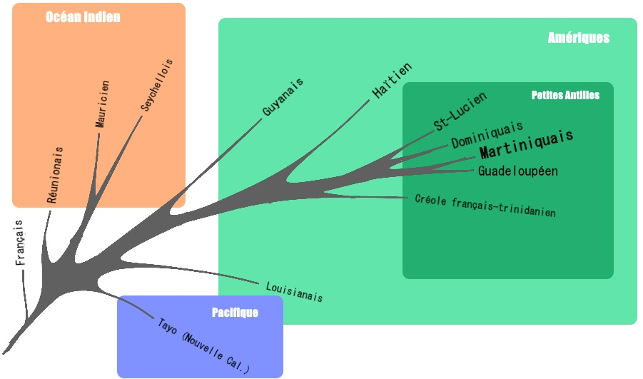 réseau de voisins avec racine, des créoles à base lexicale française, plus le français standard